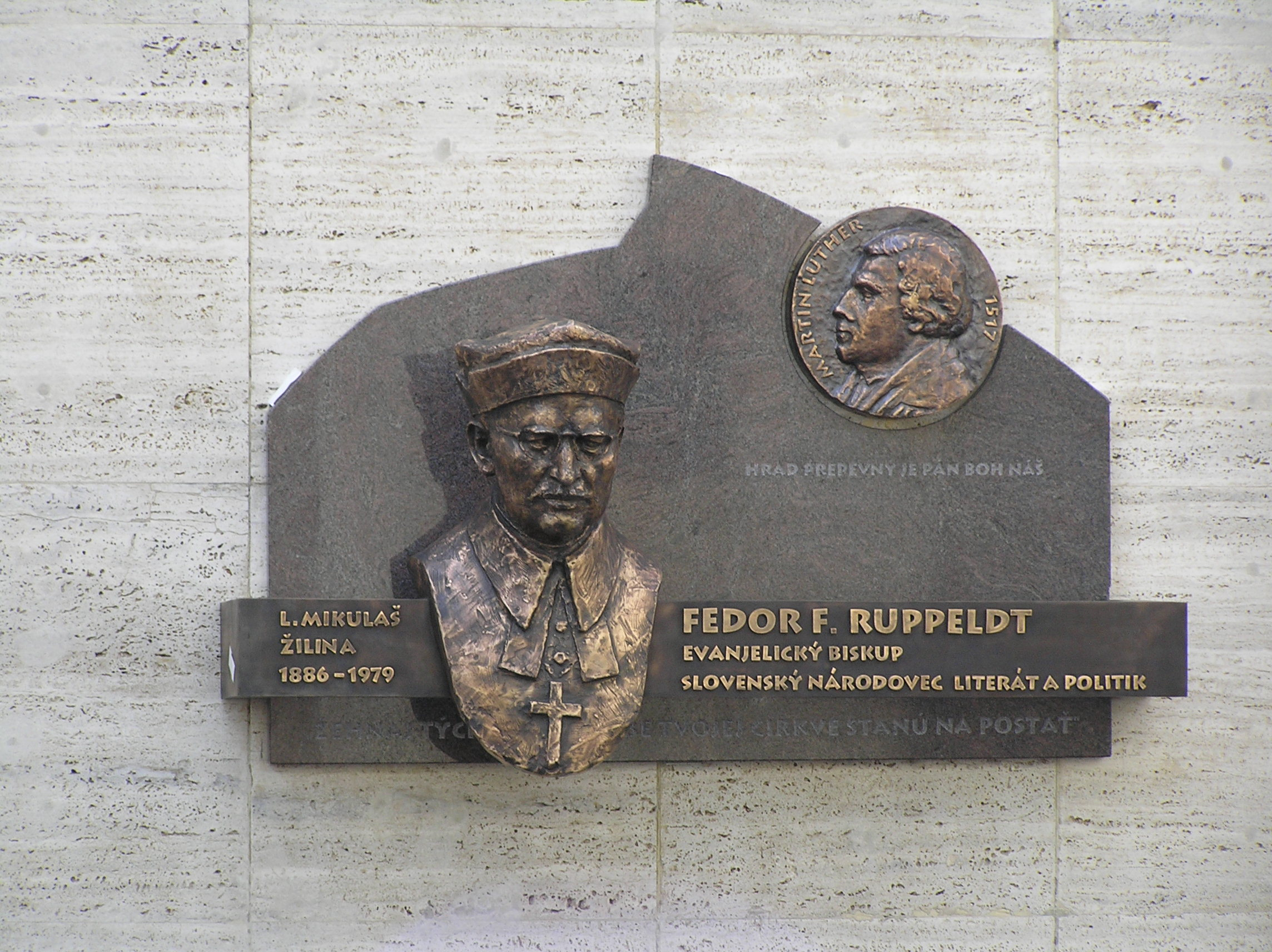 Odhalená busta